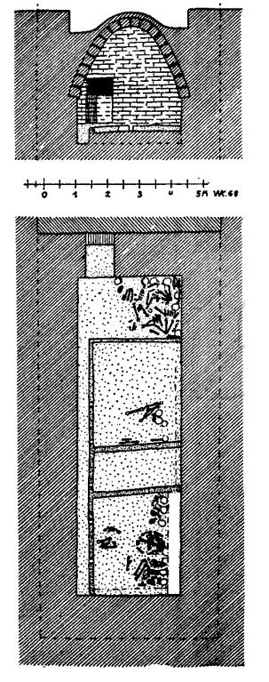 نقشه آرامگاه هفت‌تپه توسط دکتر کلایس